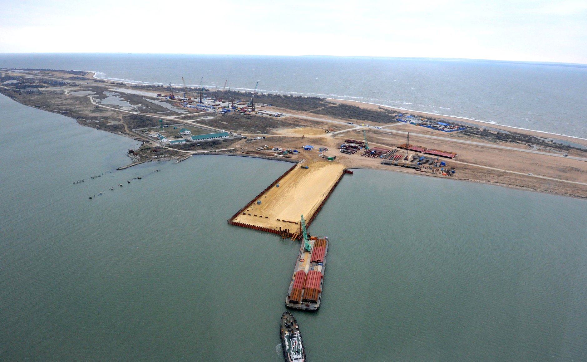 Район строительства Крымского моста